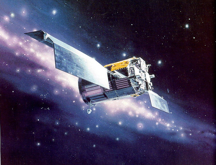 Eine Zeichnung des TAOS-Satelliten (TAOS: Technology for Autonomous Operational Survivability, etwa: Technologie fÃ¼r autonome operationelle ÃœberlebensfÃ¤higkeit)